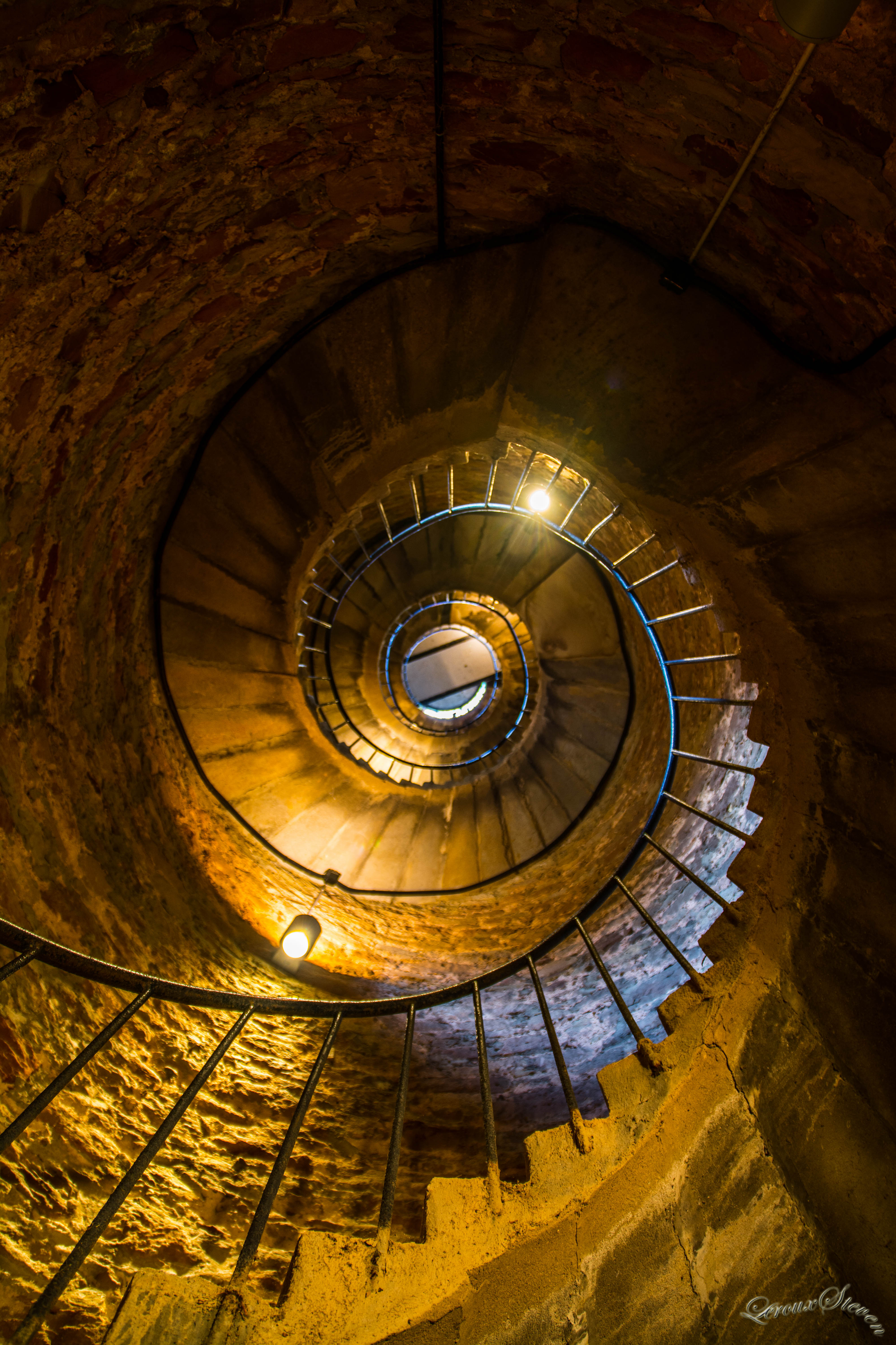 Chateau du schlossberg